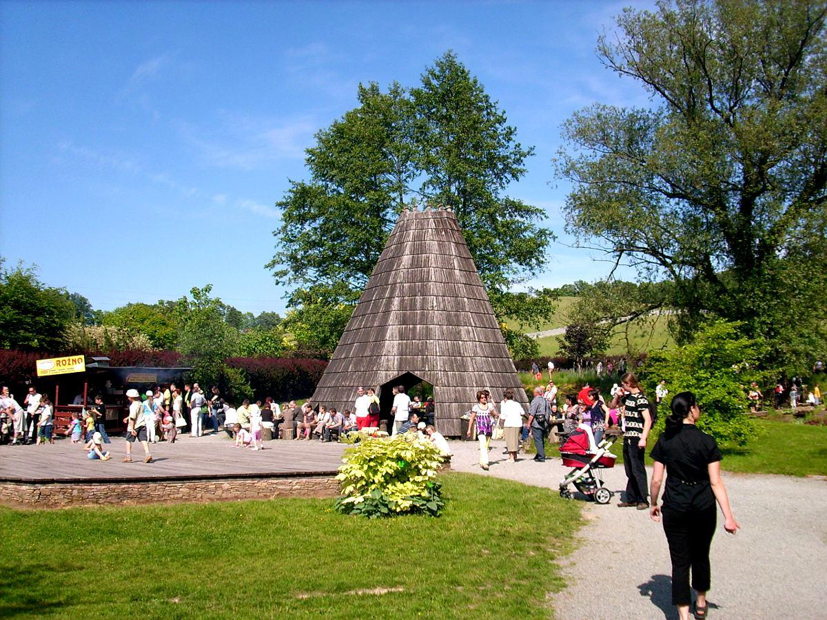 Arboretum w Wojsławicach.